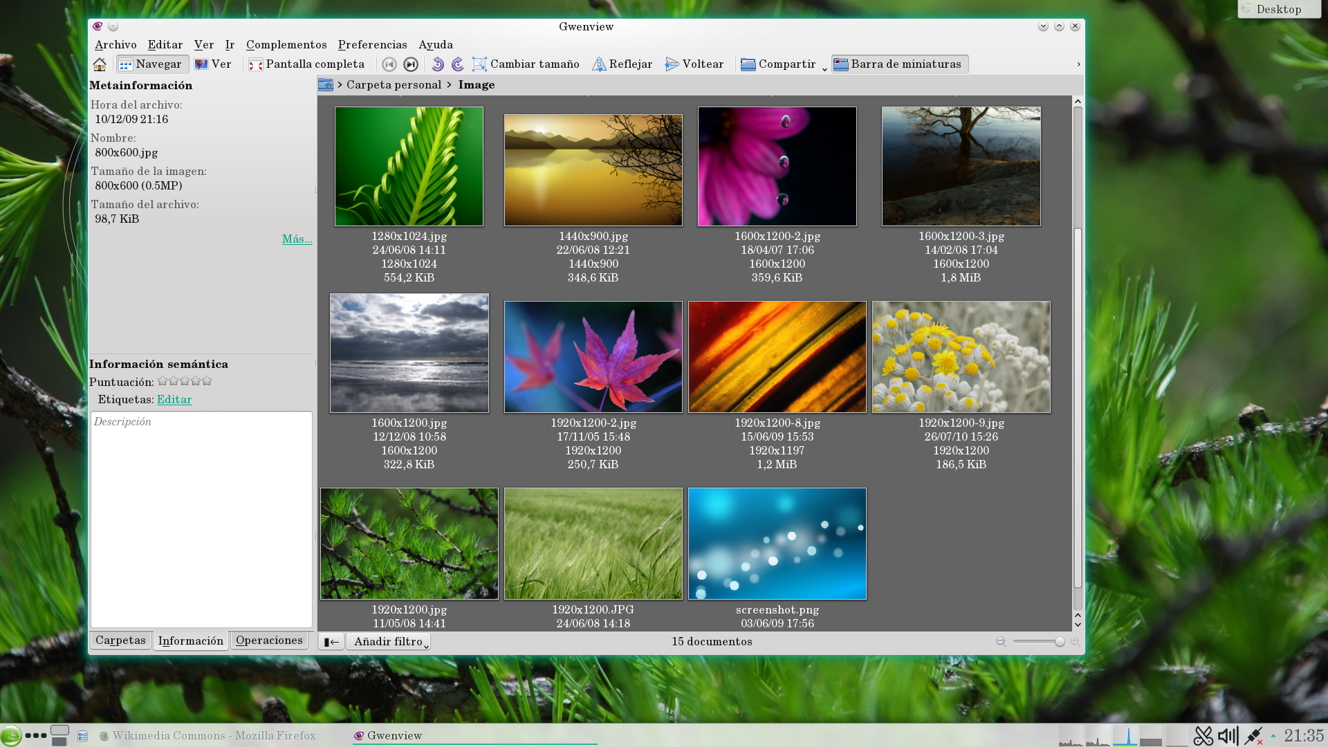 Gwenview versión 4.14.0 en español, opensuse 13.2.